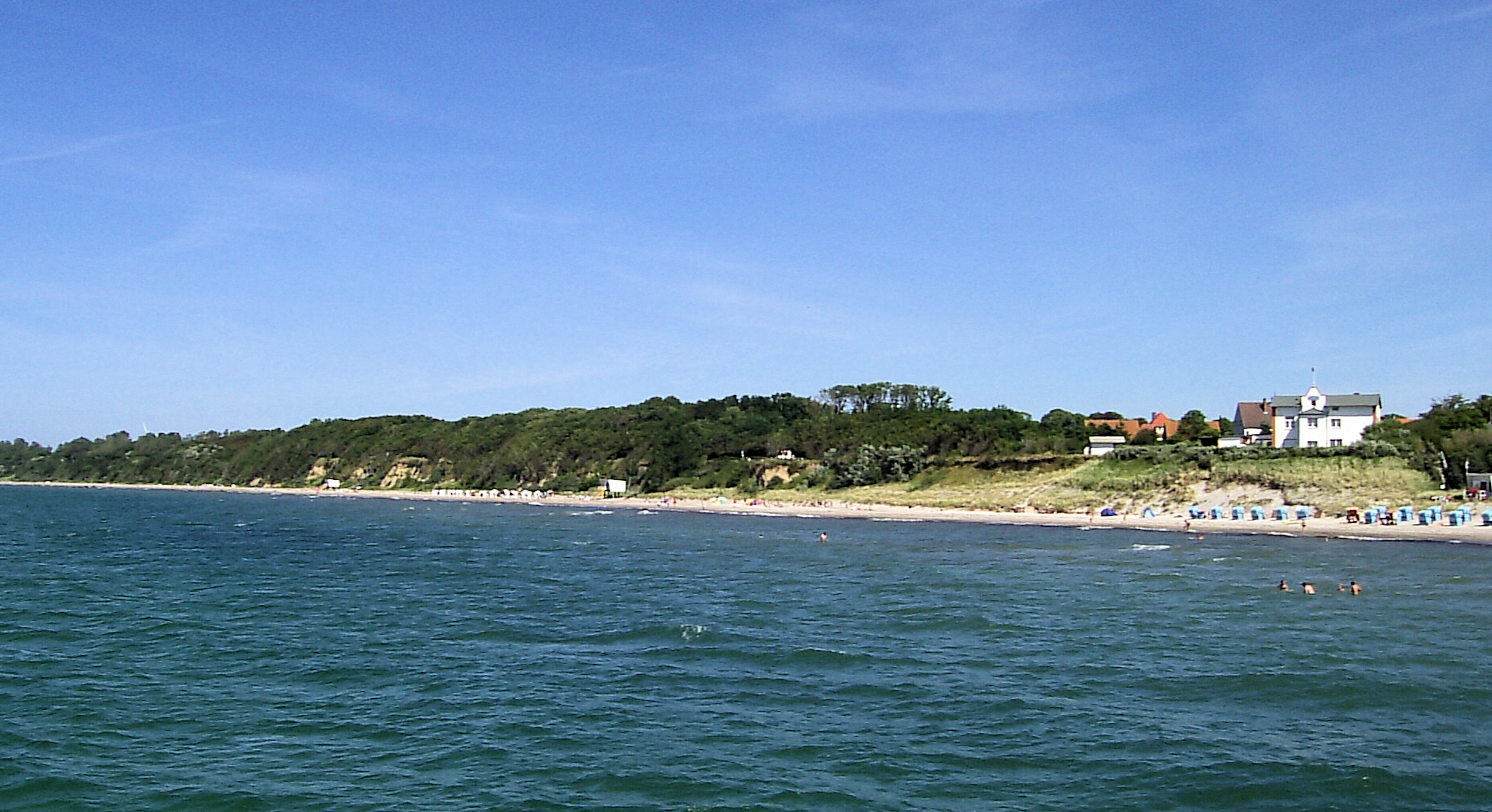 Strand Rerik